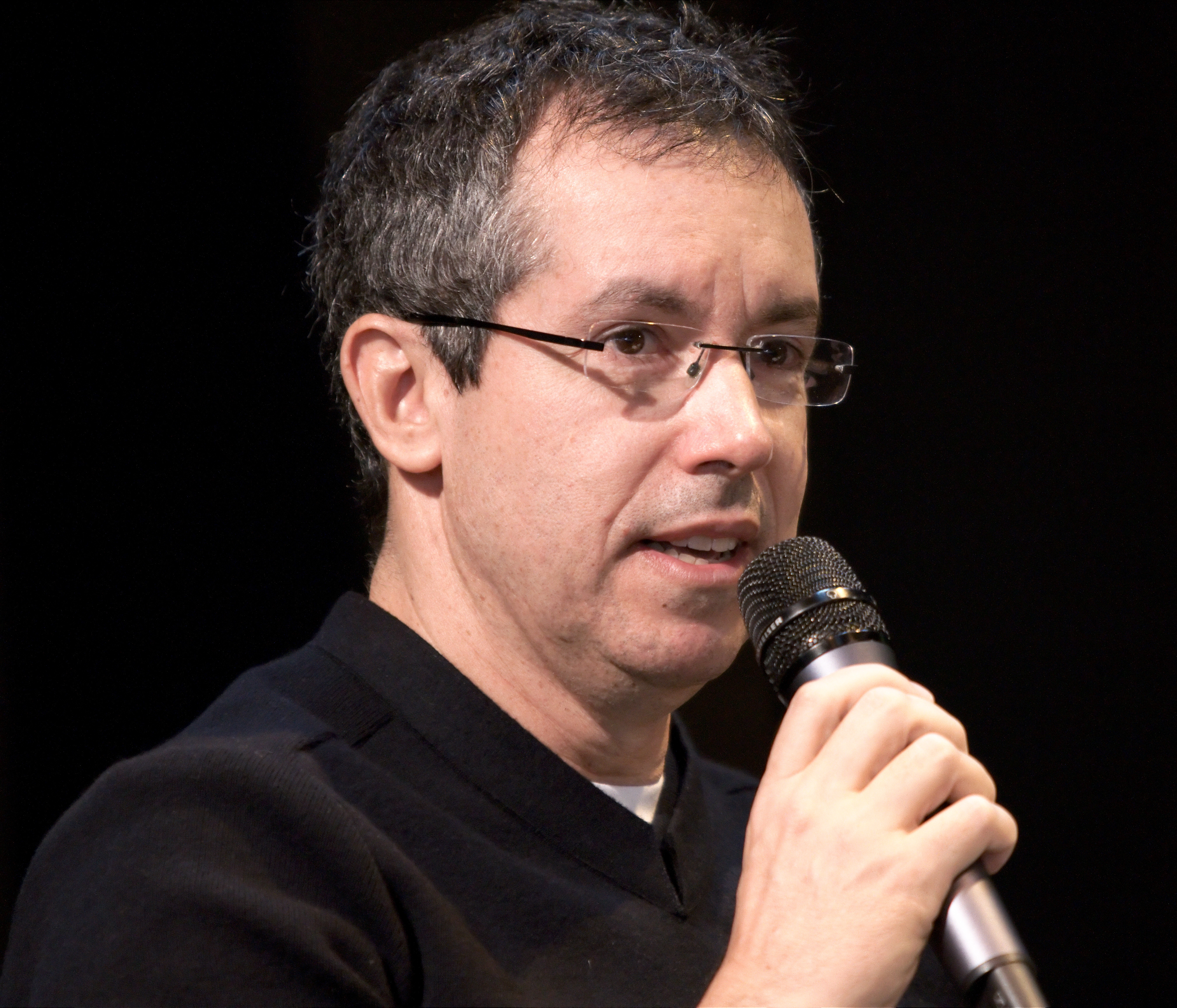 L'auteur brésilien Bernardo Carvalho au Salon du livre de Paris lors de la conférence La société, source d’inspiration.